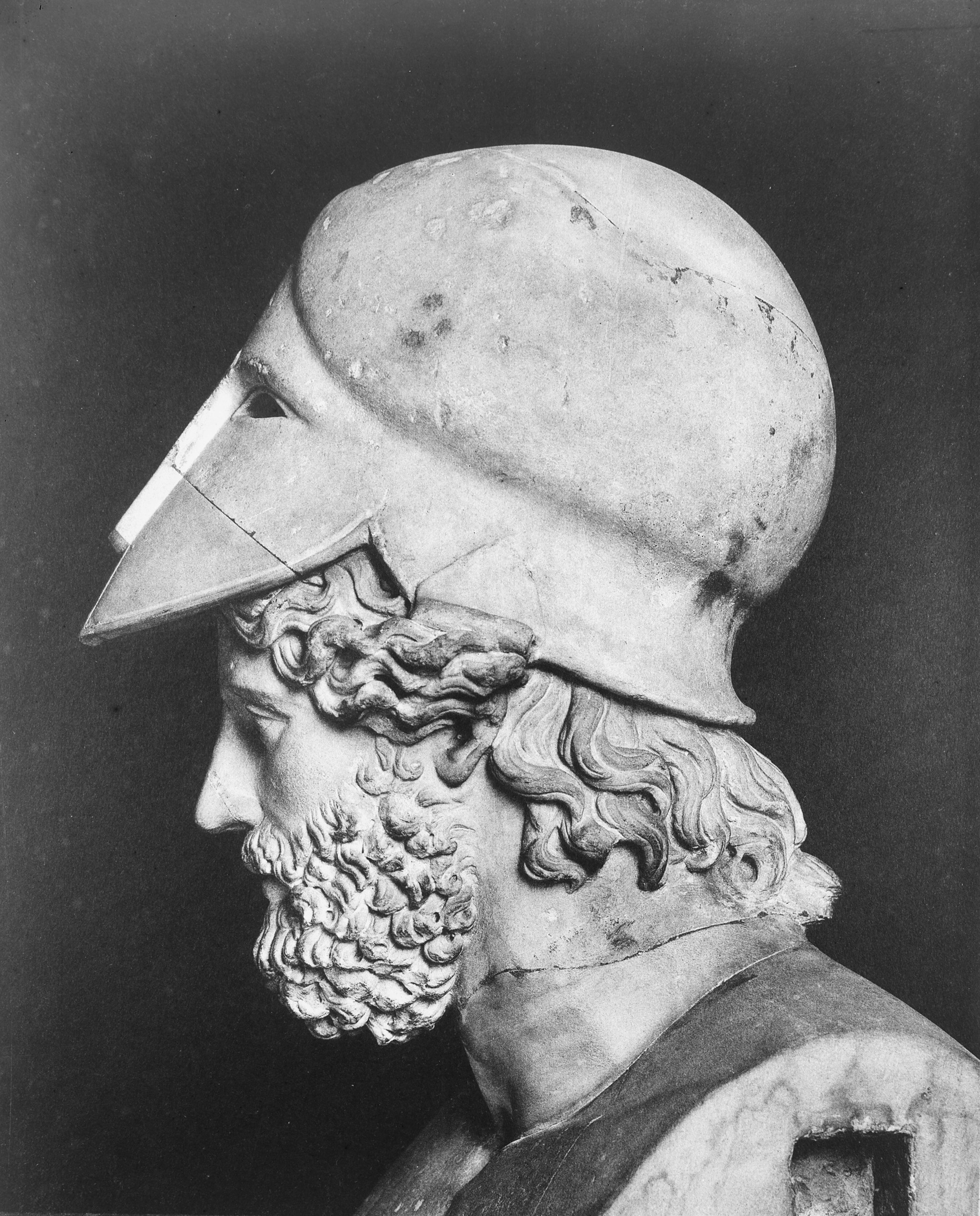 Beeld: Beeld, Themistocles (opmerking: Reproductie van foto)